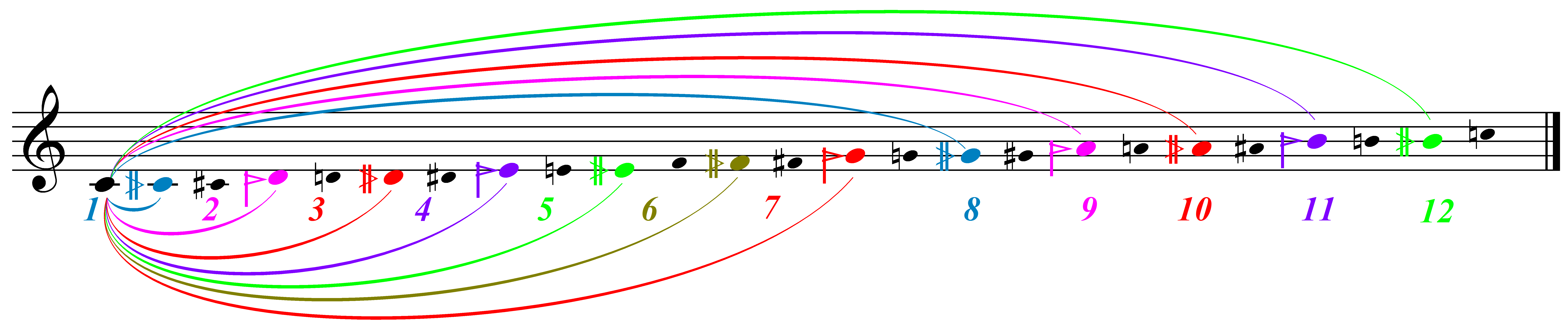 گام کروماتیک با فواصل مختص موسیقی ایرانی